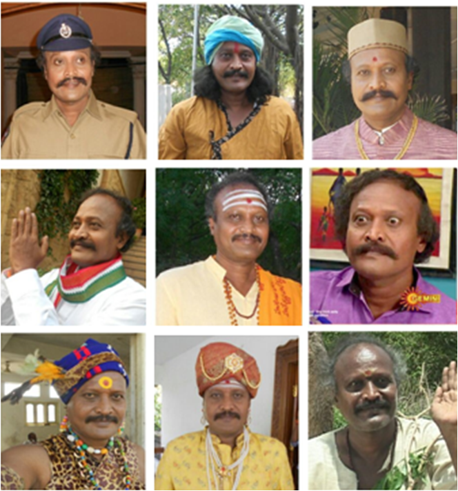 వివిధ సీరియళ్లలో వివిధ పాత్రలలో తాతా రమేశ్ బాబు